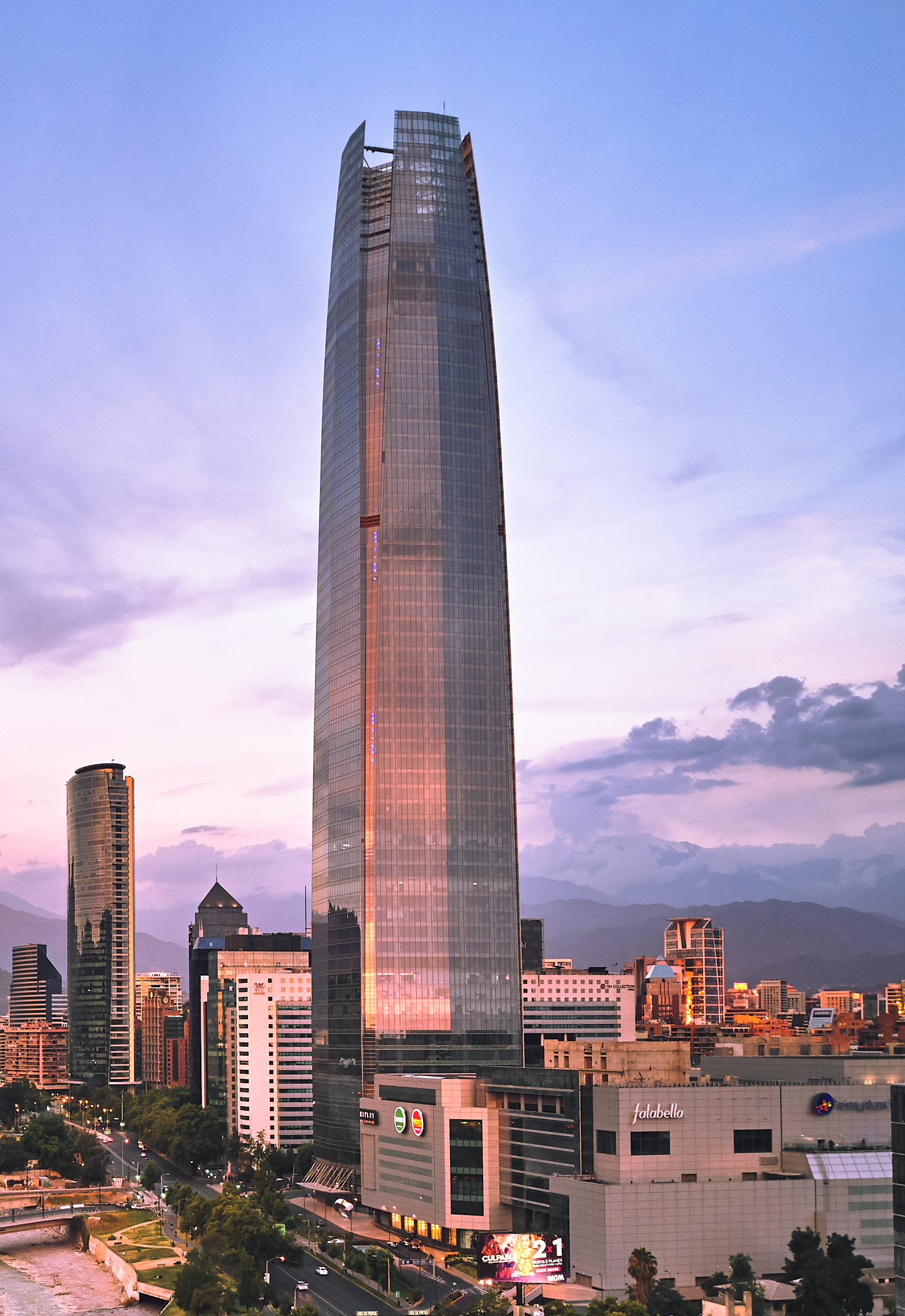 Gran Torre Santiago